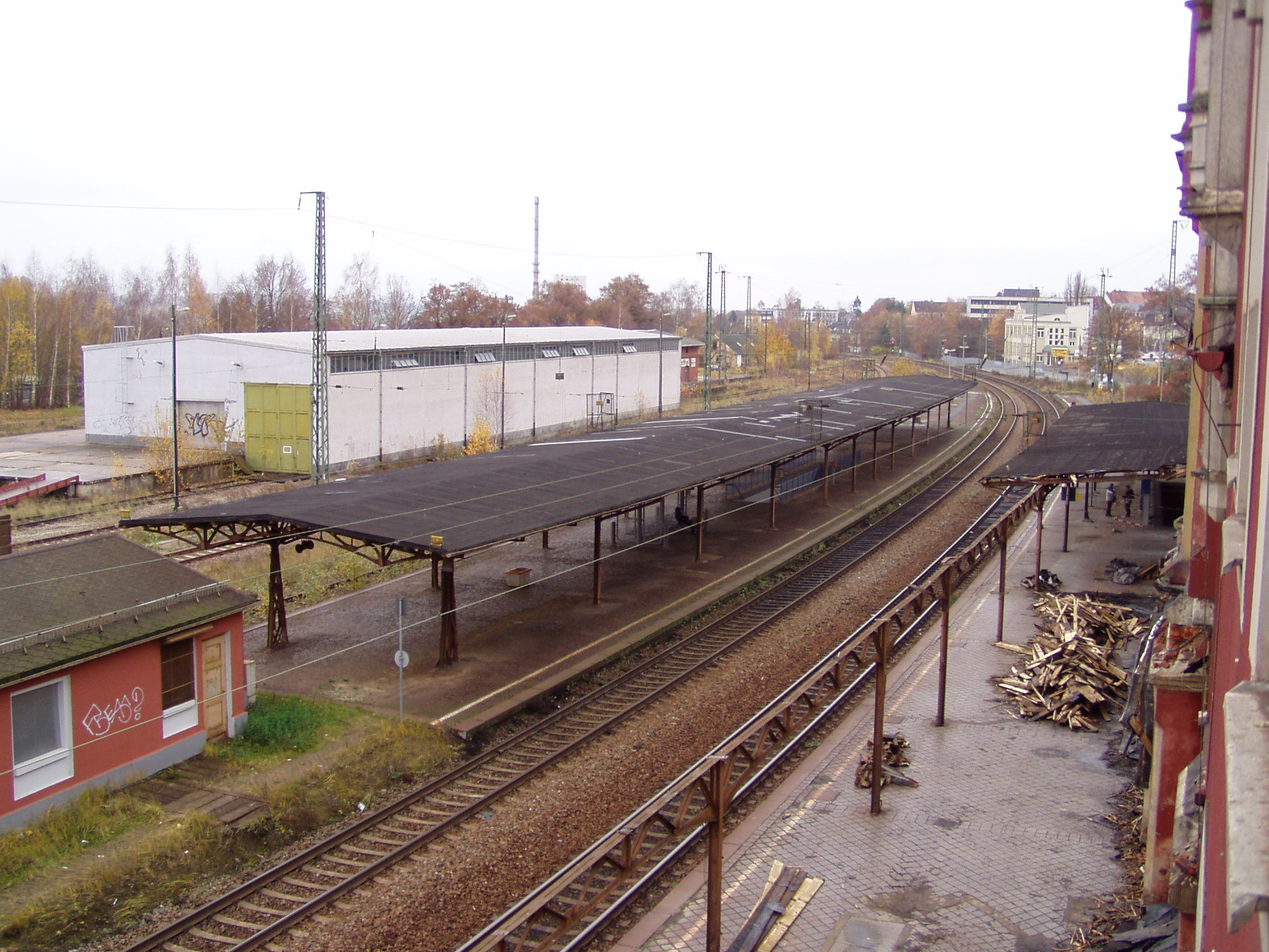 Bahnhof Hohenstein-Ernstthal abriss 2007